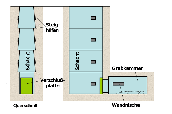 Tuvixeddu